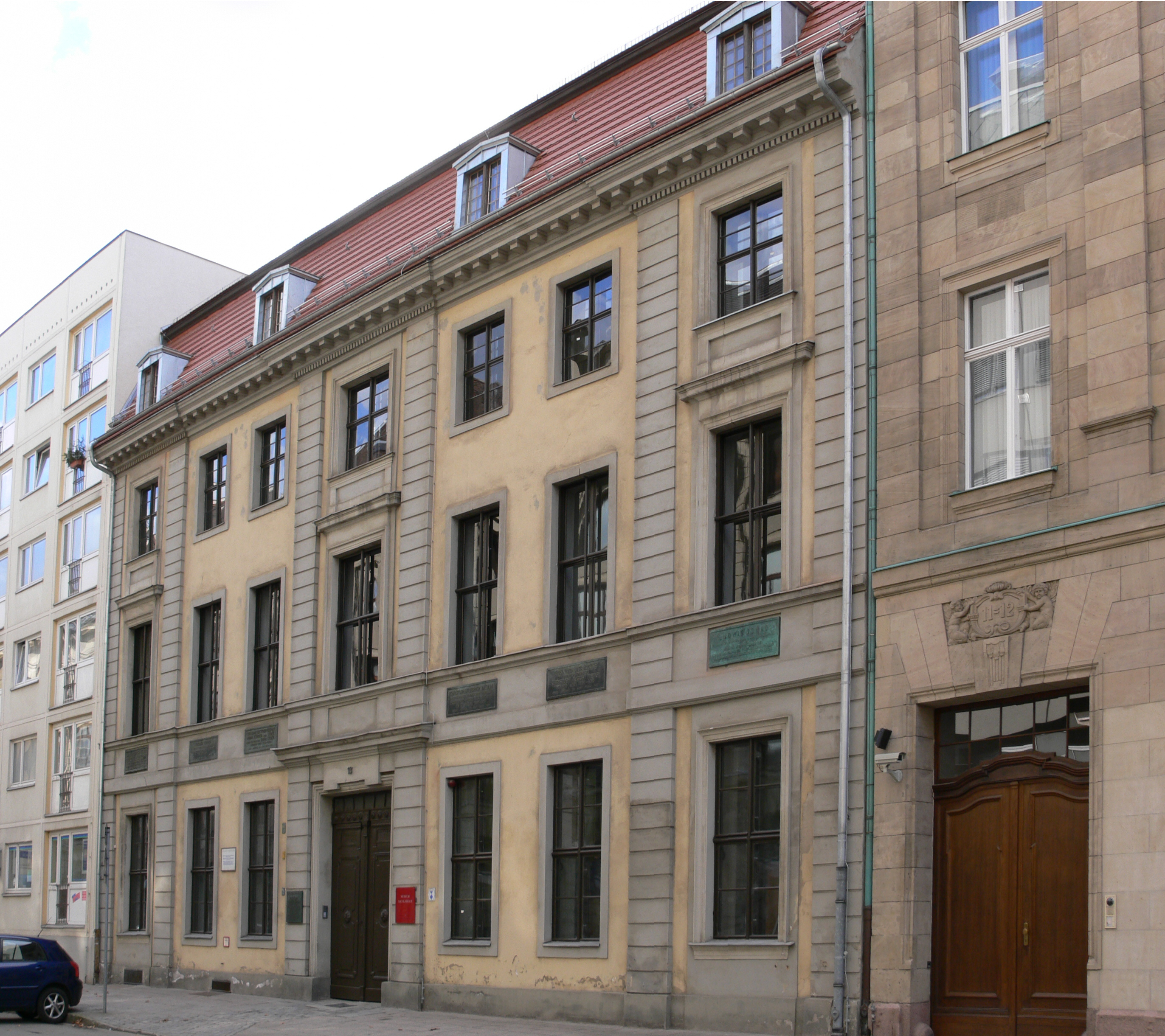 Museum Nicolaihaus, Brüderstraße, 11078 Berlin-Mitte